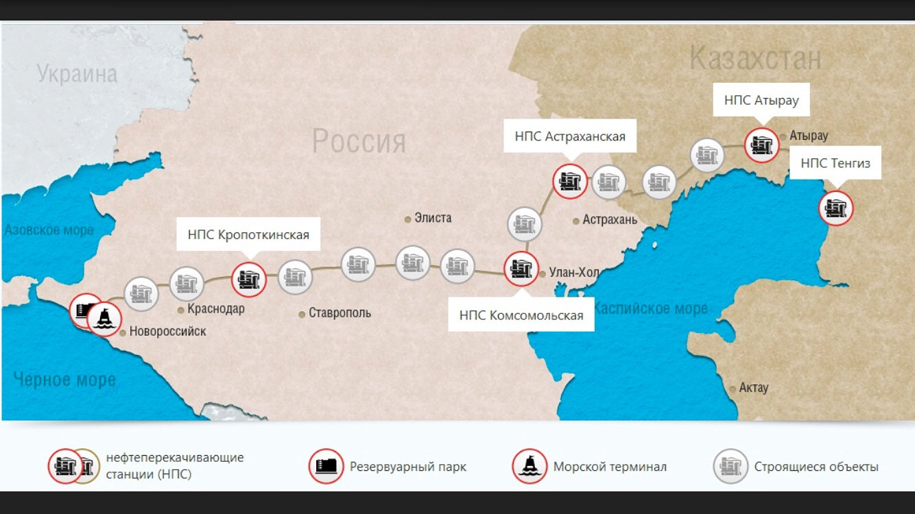 Карта проекта расширения КТК